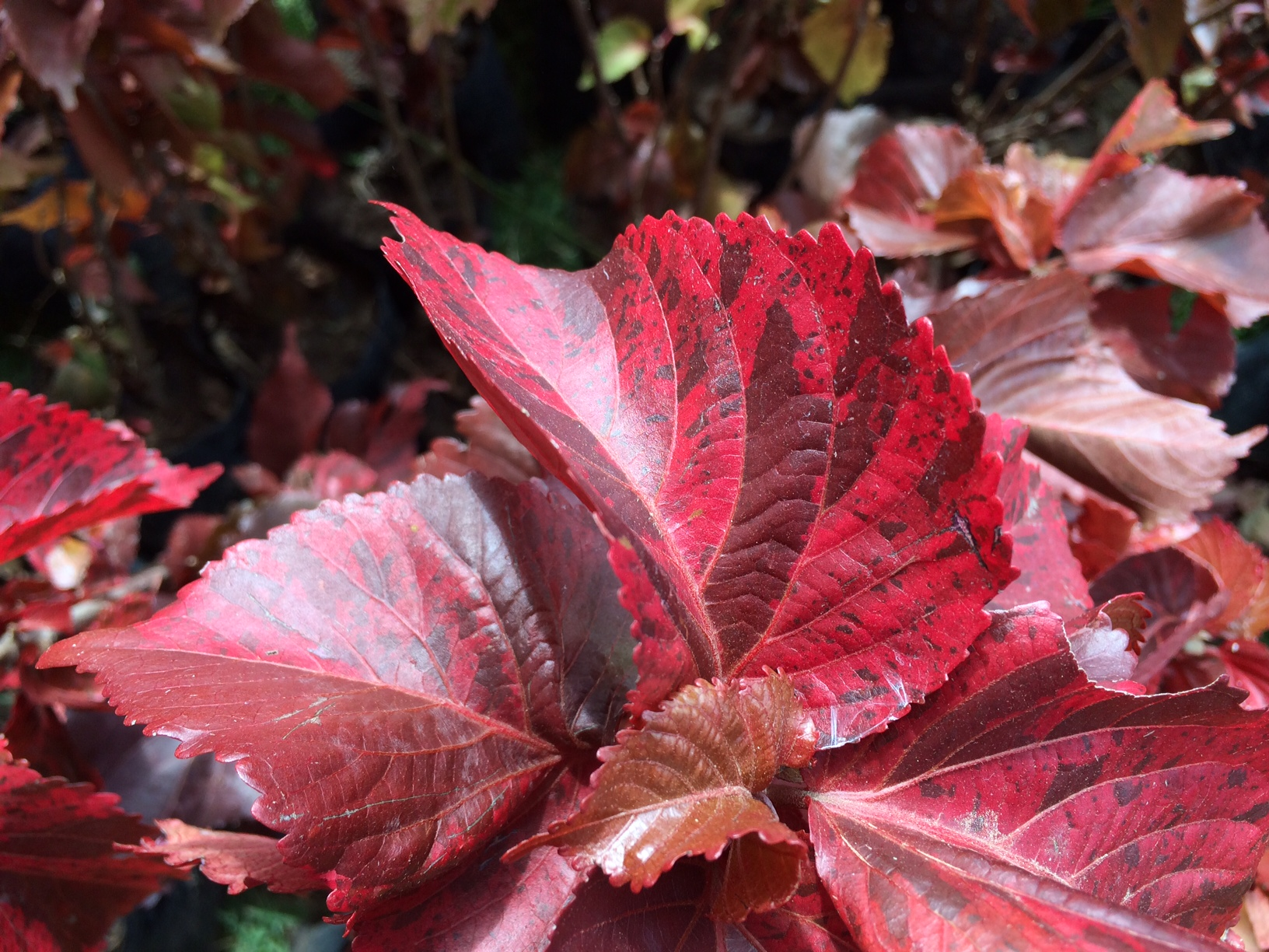 Fotografia detalhada de uma folha de Flamengueira.